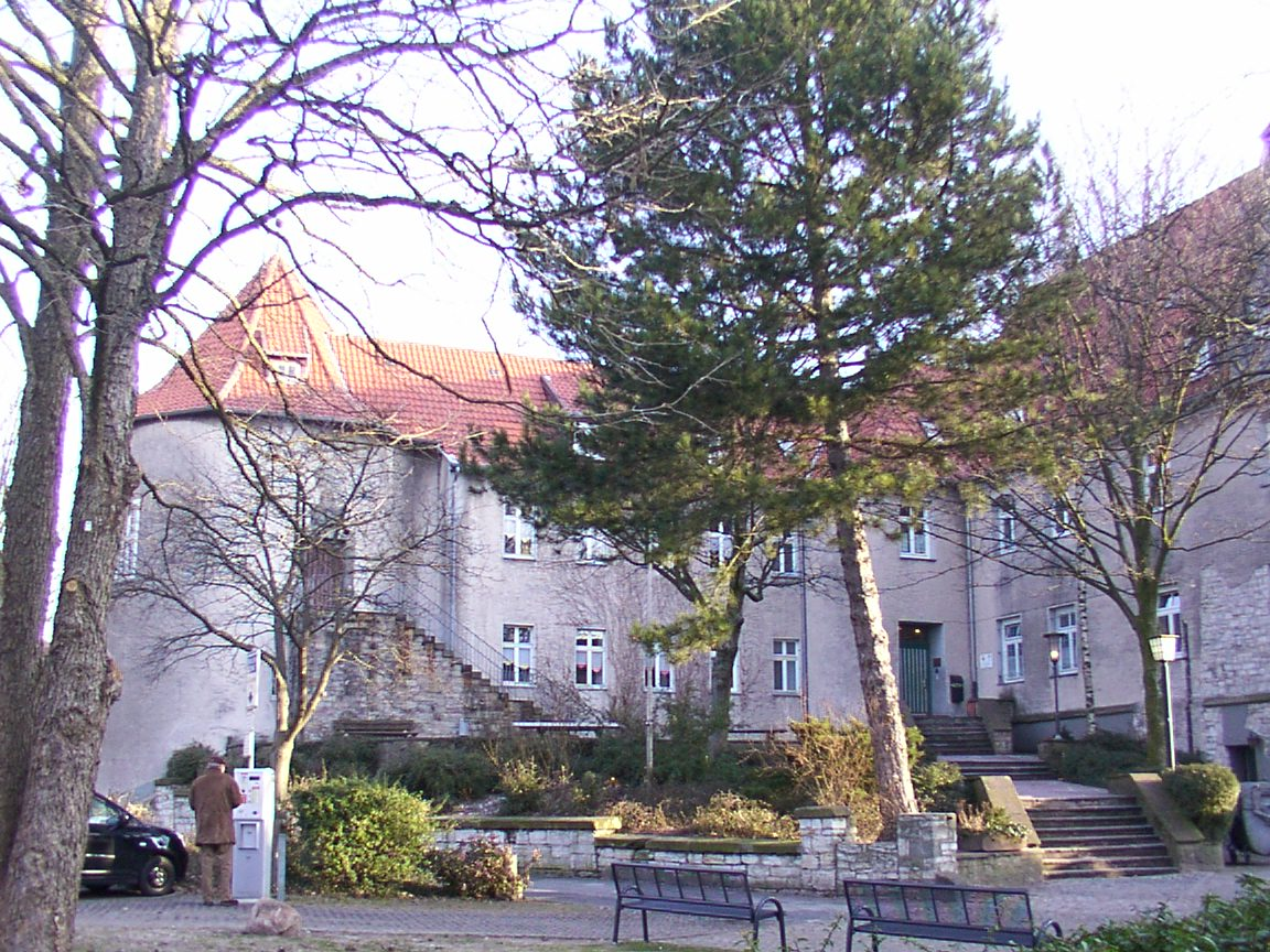 Paderborn: Jugendherberge Heiersburg, Eingang. Hier war während der Zeit des Nationalsozialismus der Hauptsitz der Paderborner Hitlerjugend. Paderborn: Youth Hostel "Heiersburg", Entrance